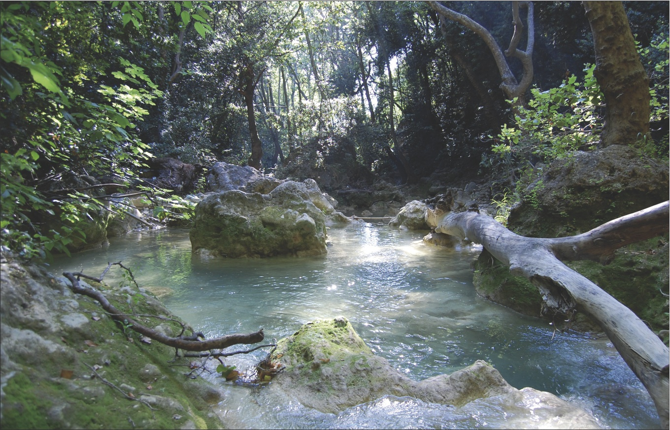 La Rivière de Dardennes constitue la première partie du petit fleuve côtier le Las.